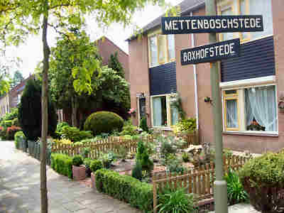 Splitsing van Boxhofstede en Mettenboschstede.